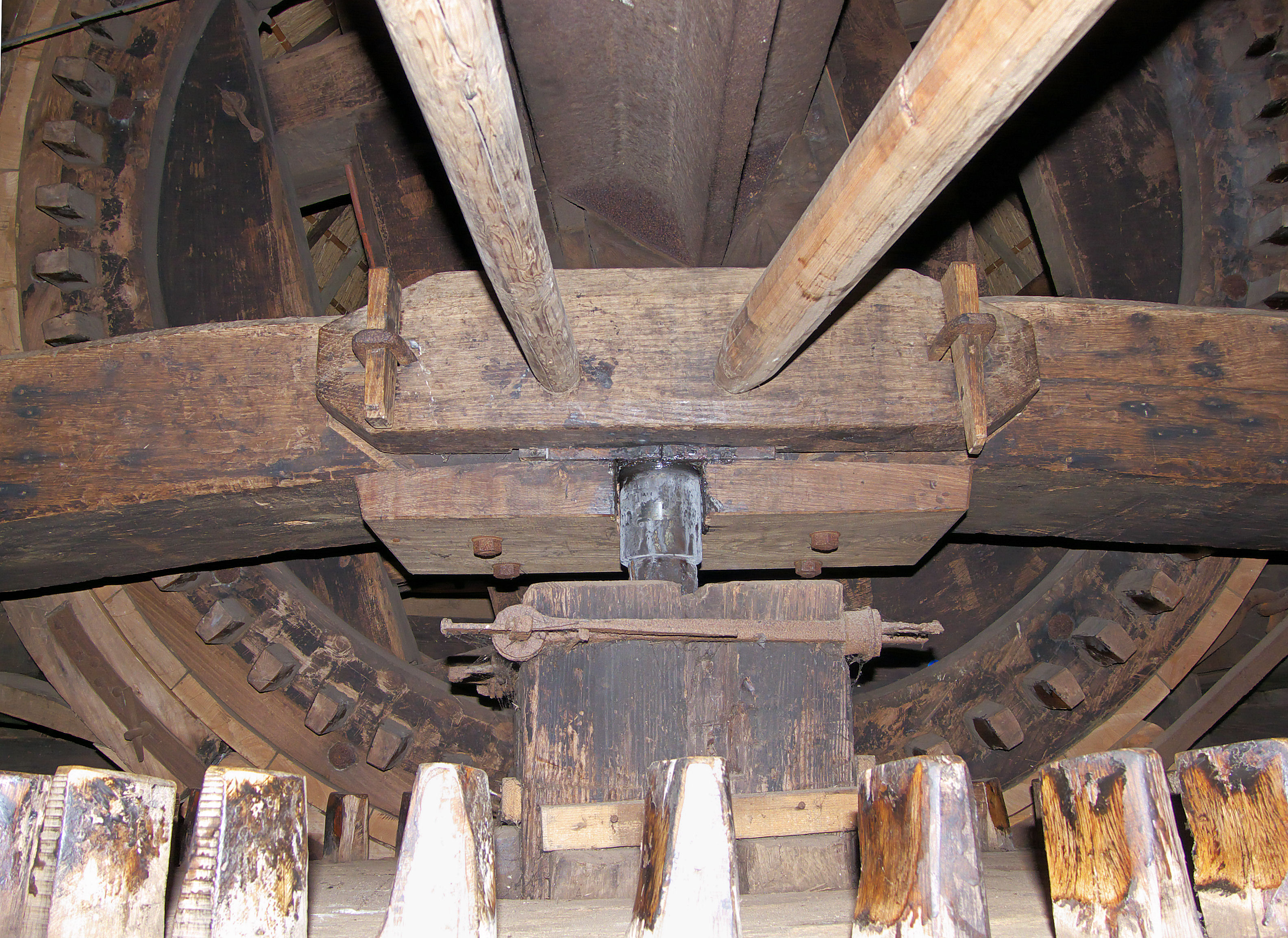 Molen De Passiebloem busdeur in ijzerbalk